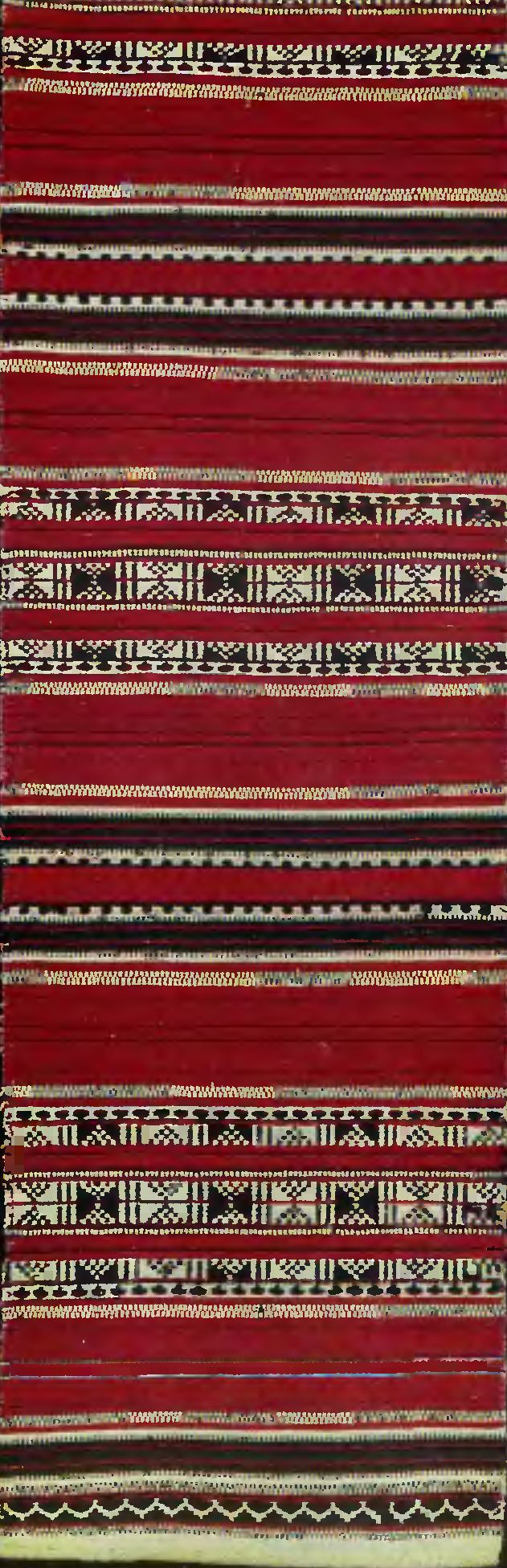 Майстар з в. Нахаў, Калінкавіцкі раён, Ручнік, 1910-гг.